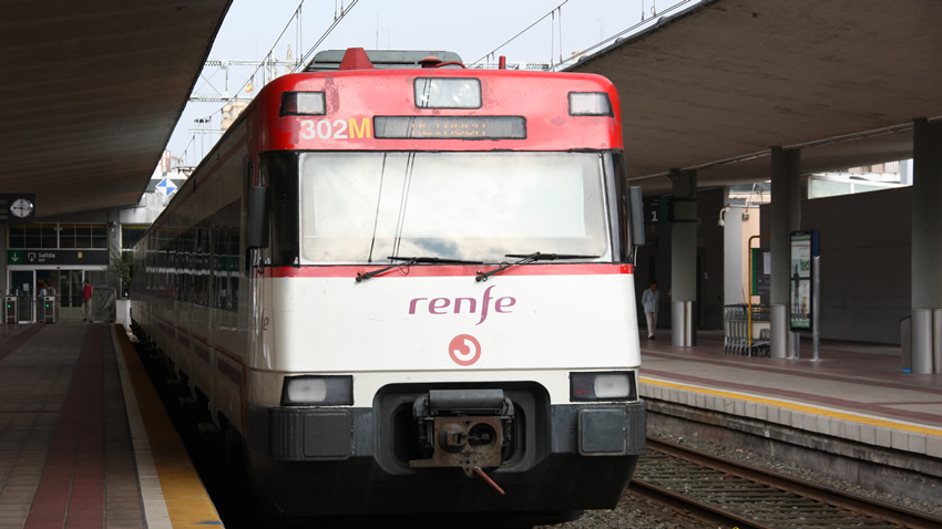 Un automotor eléctrico de la serie 447 de Renfe Operadora para servicios Cercanías Santander en la estación de Santander (Adif).